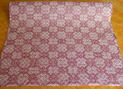 Skuggväv.. Se även detalj här